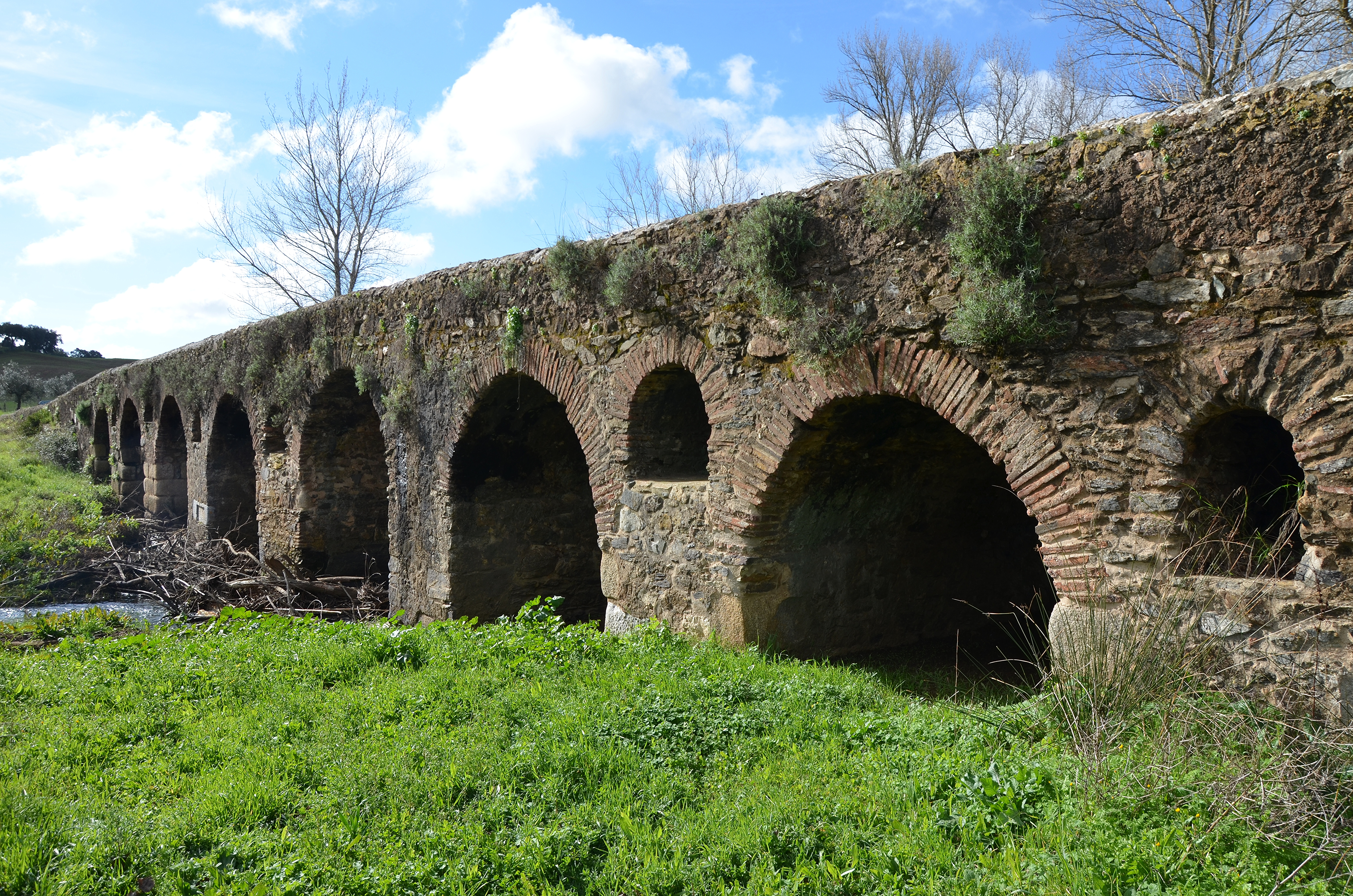 Roman Bridge, Ponte Romana de Vila Ruiva, Lusitania, Portugal